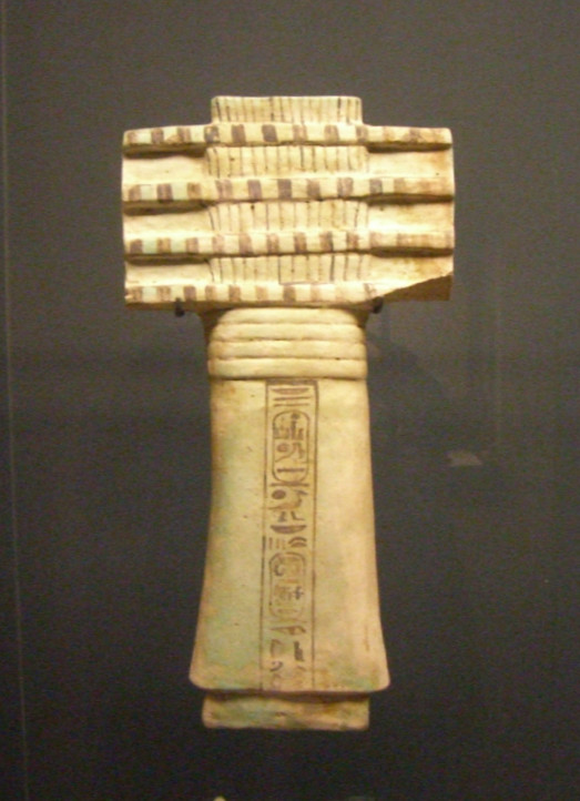 Amulette en forme de pilier Djed au nom de Ramsès IX - XXe dynastie égyptienne - Musée du Louvre